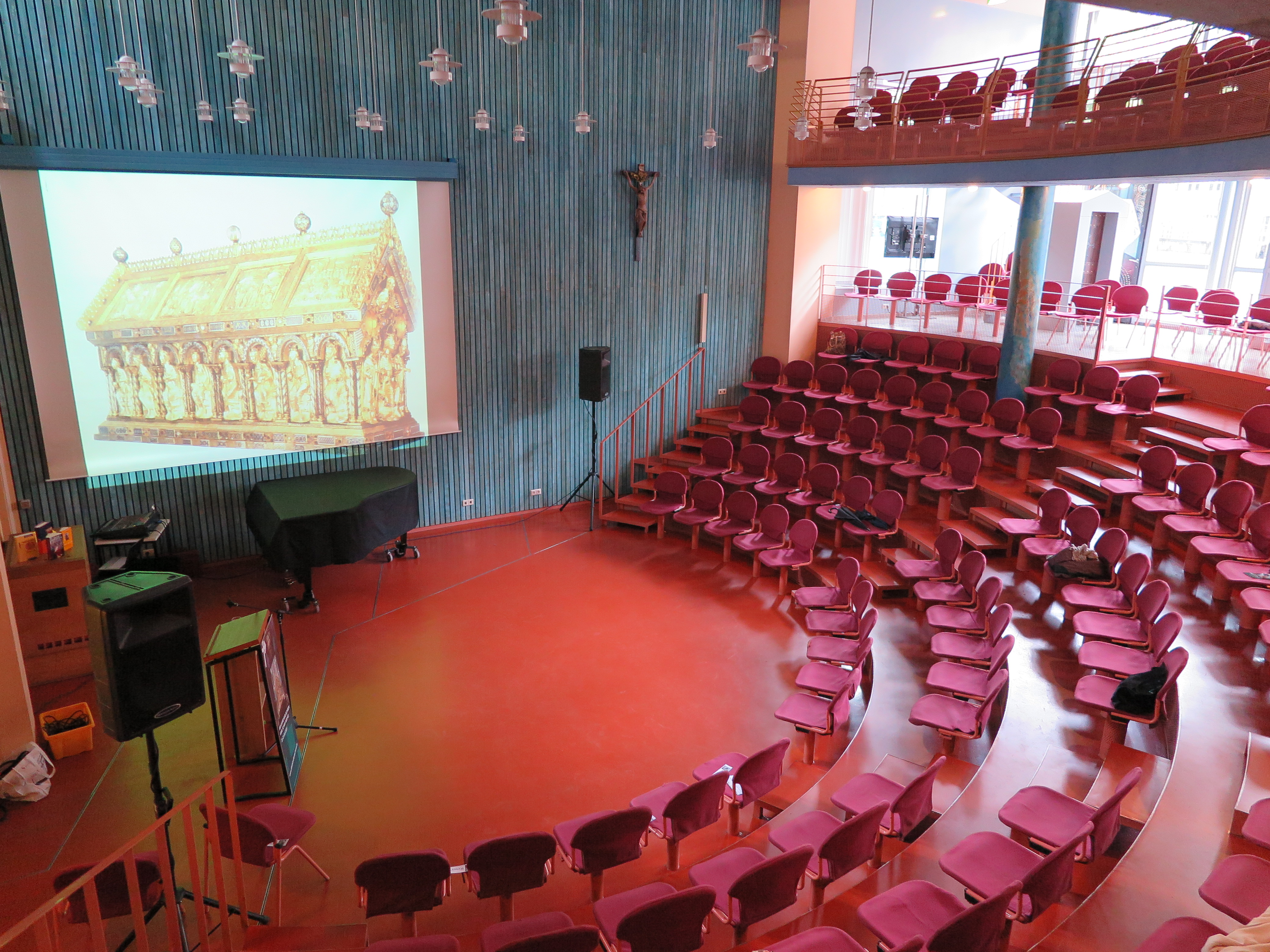 Aula der Aachener Domsingschule während einer Pause bei der Vortragsreihe Karl der Große, Karlsschrein und Heiligsprechung am 25. Juli 2015 anlässlich der Feierlichkeiten „800 Jahre Karlsschrein“.